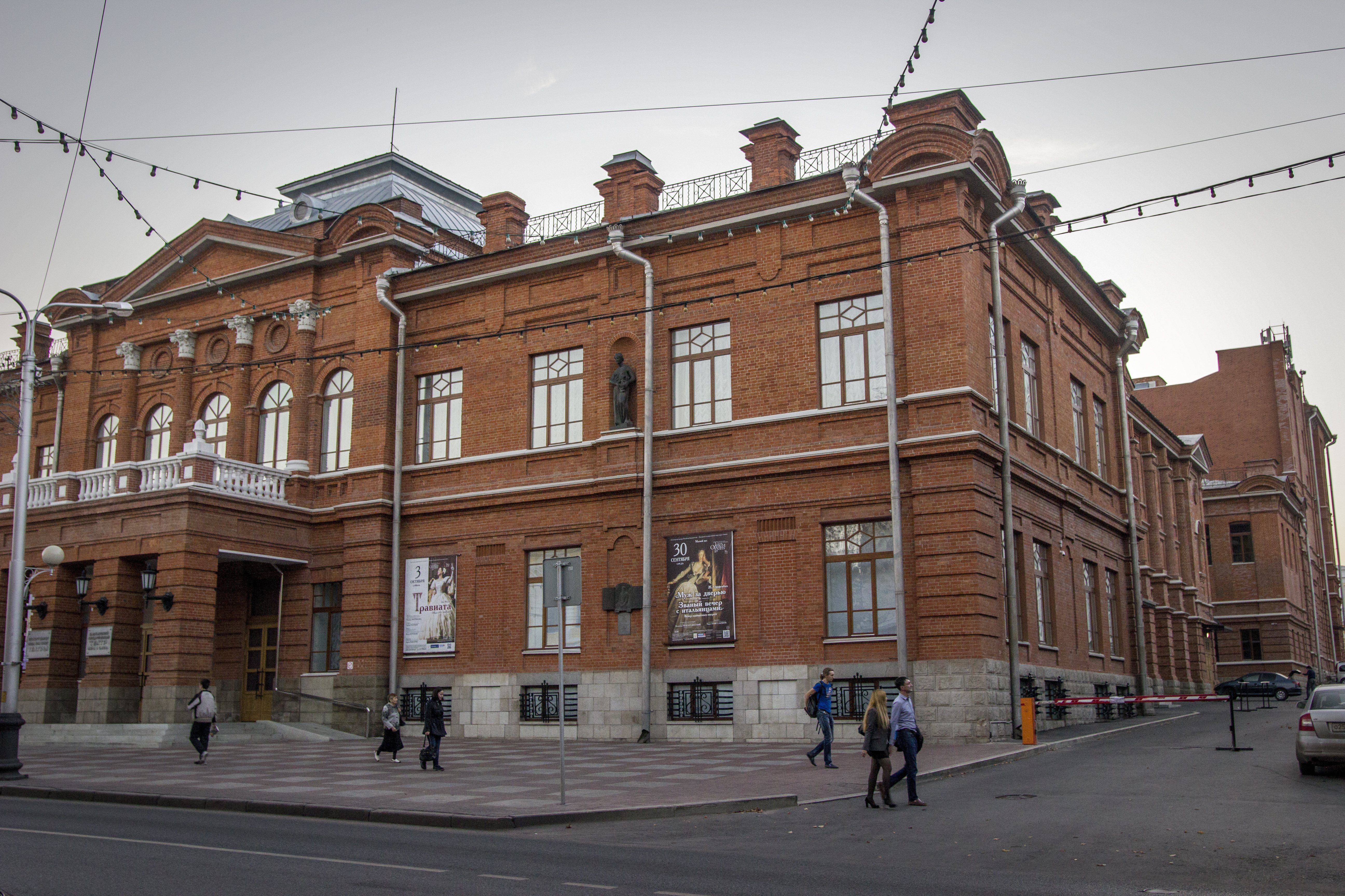 Народный дом С.Т. Аксакова: улица Ленина, 5а / улица Пушкина, Уфа, Башкортостан